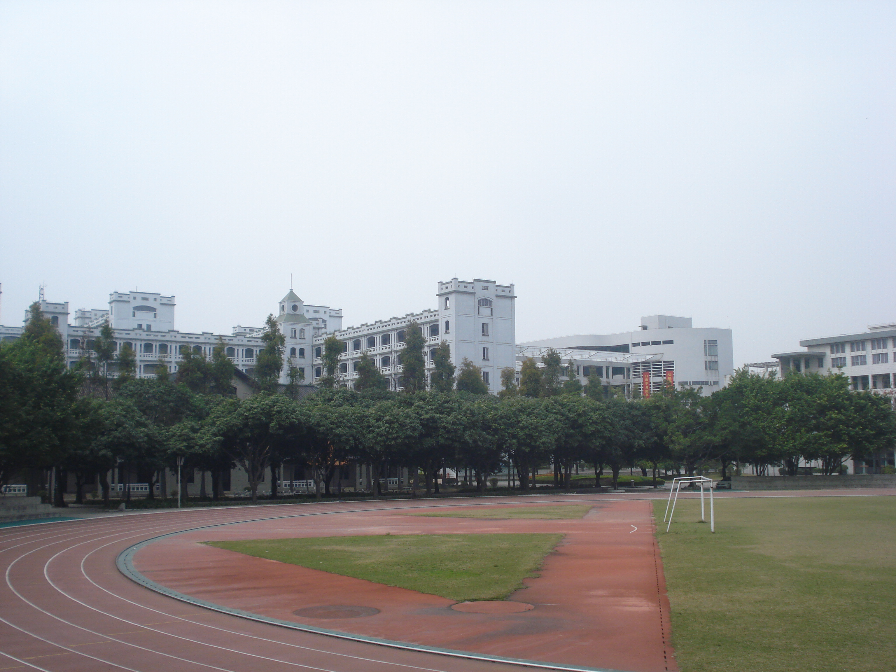 佛山一中－古典与现代错落